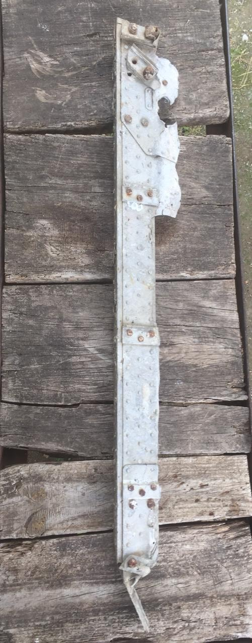 WING PART